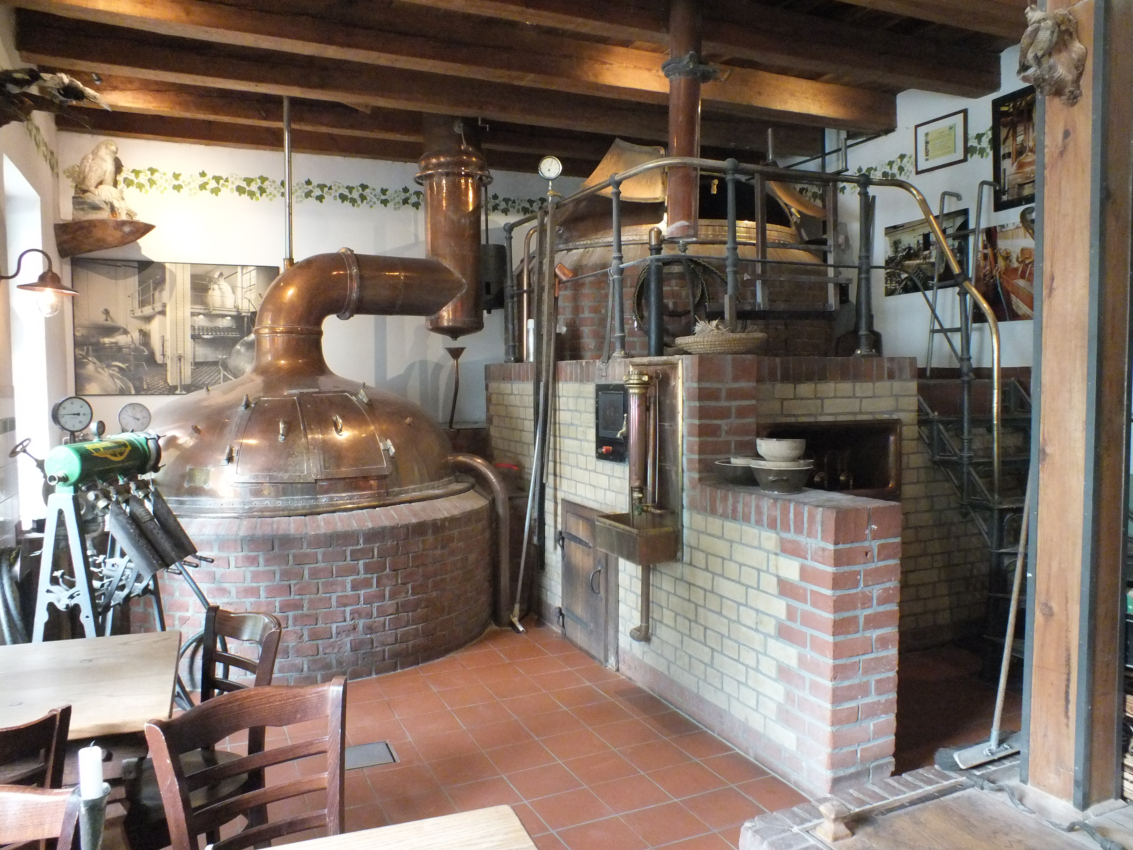 Brauereimanufaktur ‚Forsthaus Templin’